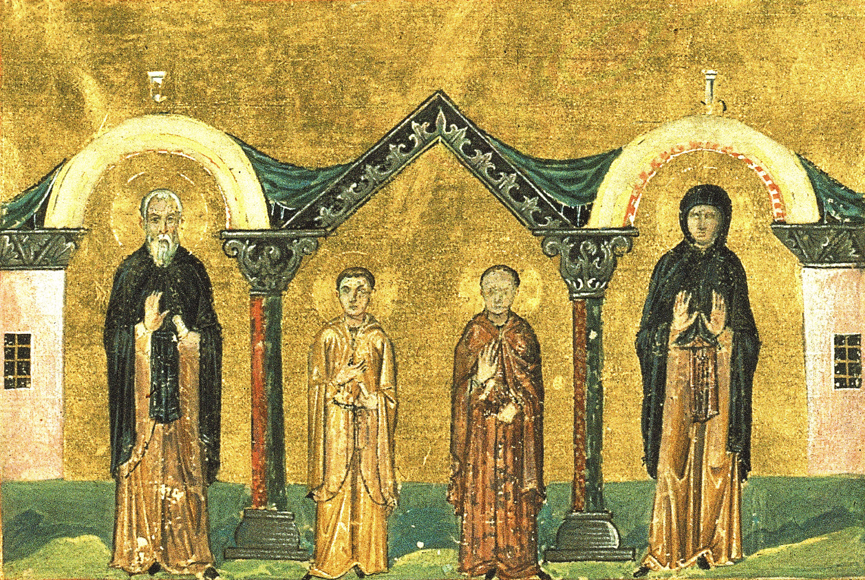 Преподобный Ксенофонт, супруга его Мария и сыновья их Аркадий и Иоанн Константинополь. 985 г. Миниатюра Минология Василия II. Ватиканская библиотека. Рим.